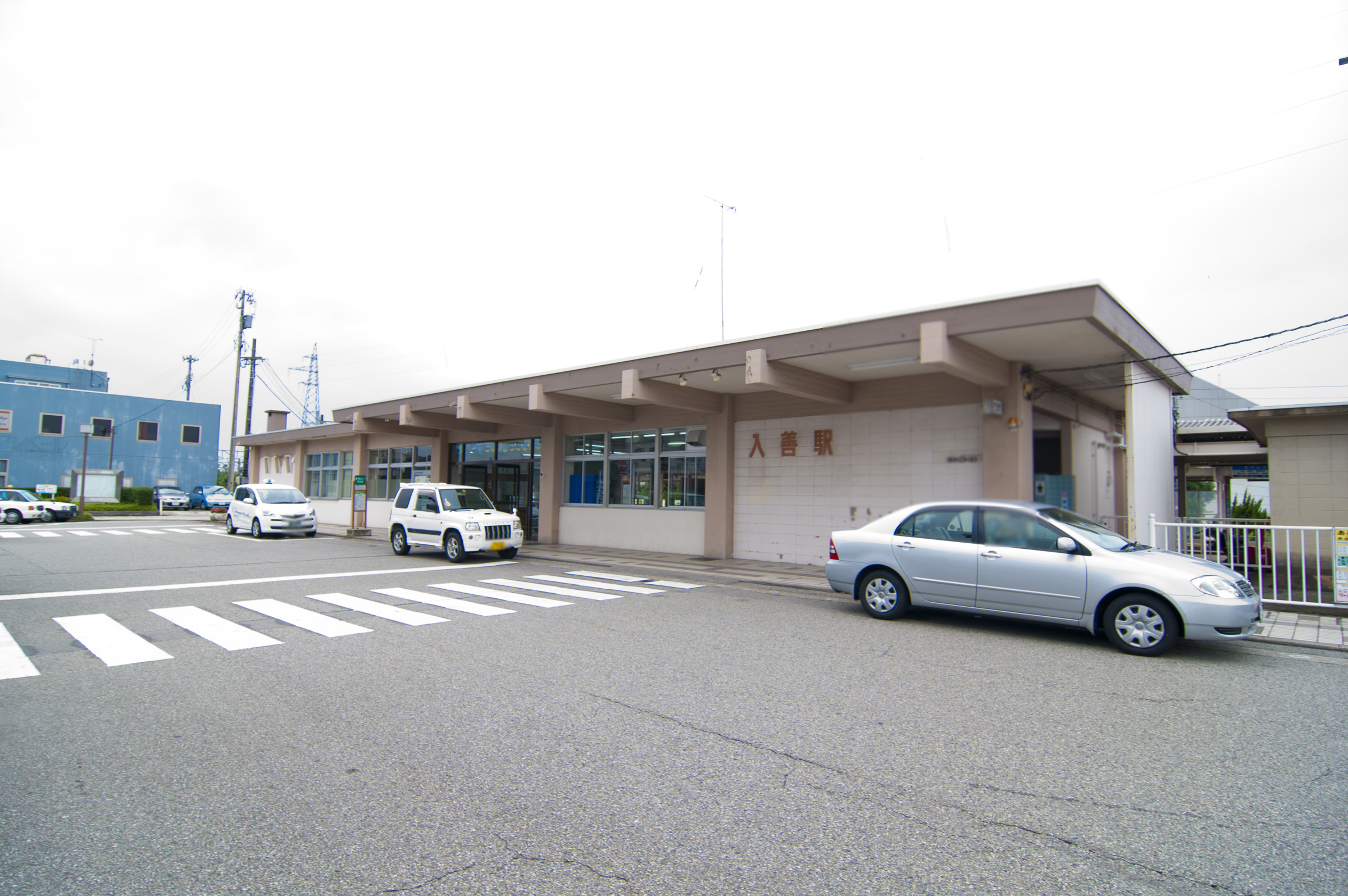 西日本旅客鉄道株式会社北陸本線入善駅